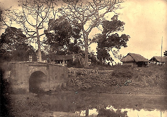 Cầu Giấy gần Hà Nội nơi mà thiếu tá hải quân Françis Garnier bị tử trận (ngày 21/12/1873) và 10 năm sau lại đến lược trung tá hải quân Henri Rivière (19/5/1883)